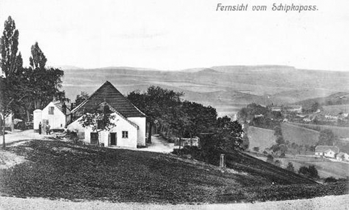 Fernsich von Prager Ausflugslokal "Schipkapaß" auf die Umgebung (Tal der Scharka). Das Lokal existiert heute nicht mehr, Ruinen finden sich am heutigen Stadtrand von Prag-Dejvice oberhalb des Šárka-Tales bei der ulice Zlatnice (Schipkapass#Schipkapass anderswo).